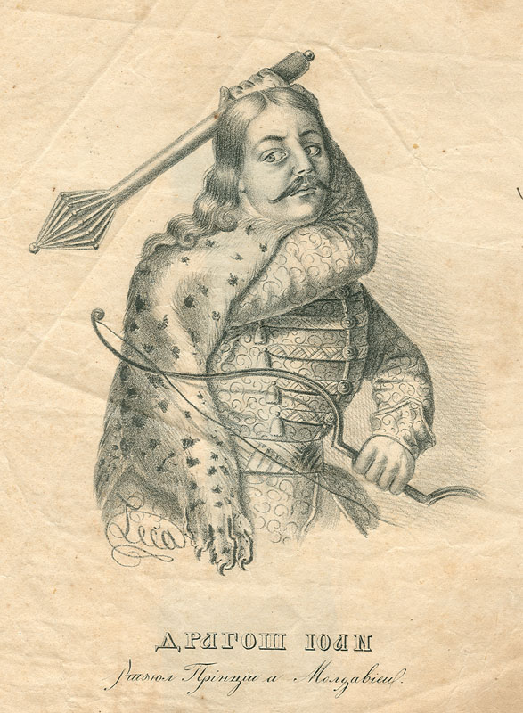 Драгош Іоан: Драгош Іоан